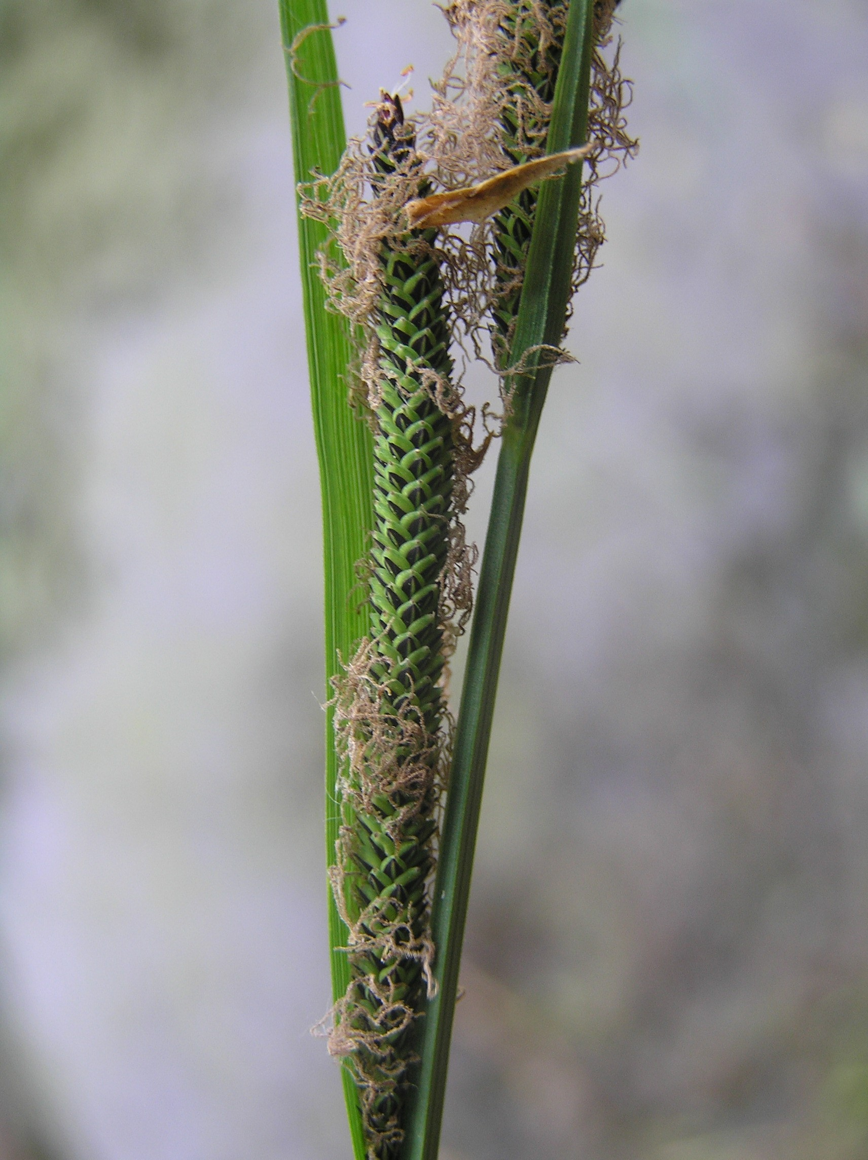 Carex buekii, Břeclav, Czech Republic